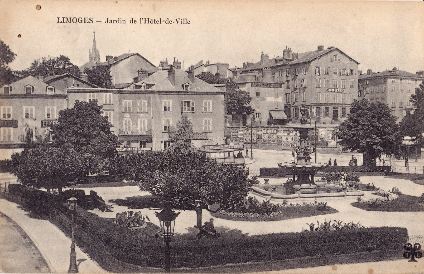 Carte postale ancienne éditée par MTIL :LIMOGES - Jardin de l'Hôtel-de-Ville